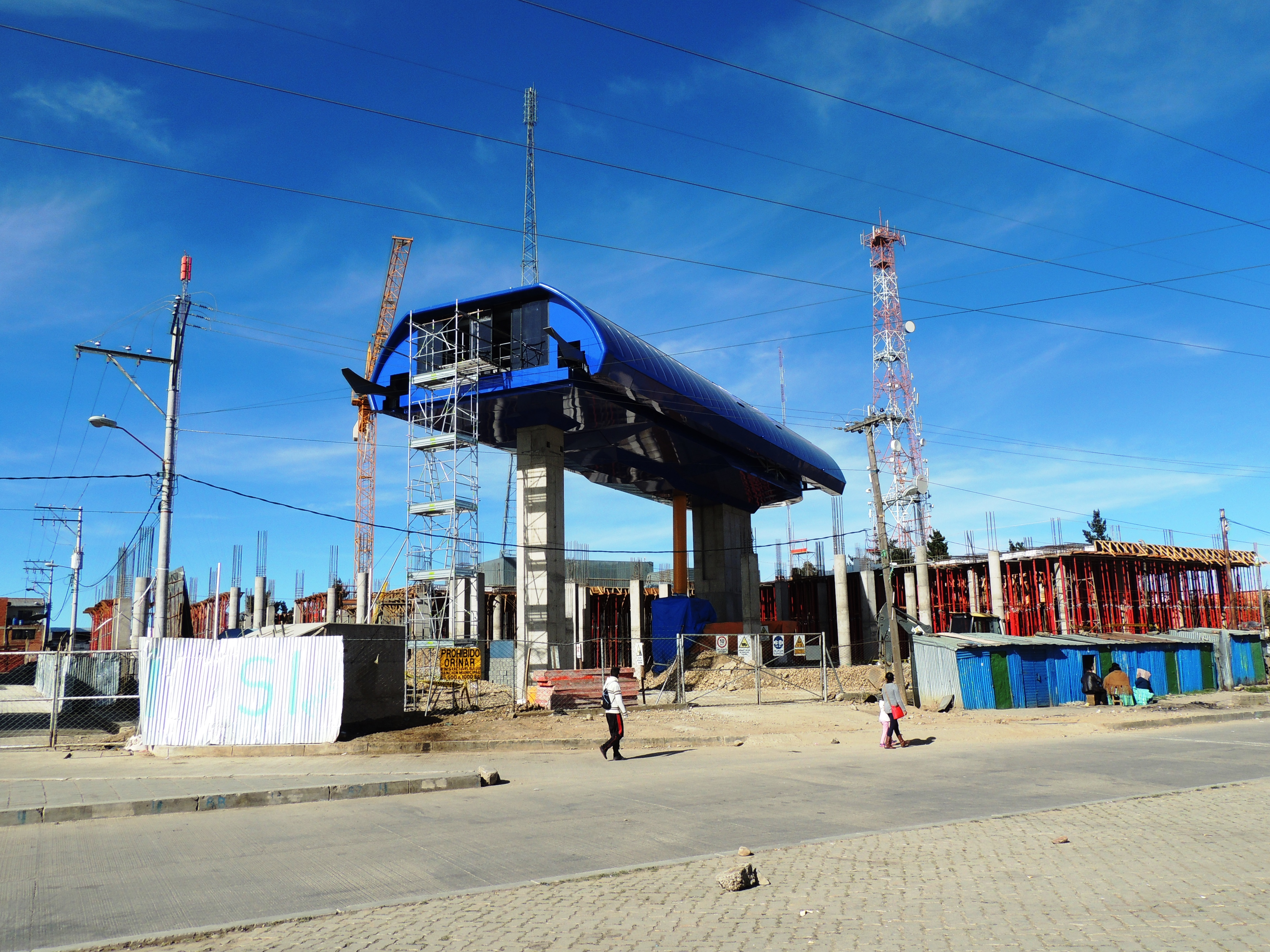 Estación Línea Azul del Teleferico La Paz El Alto